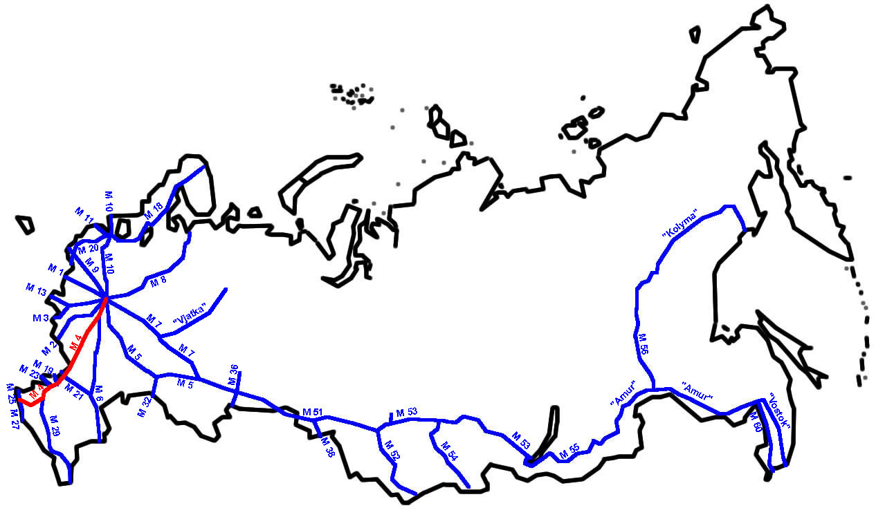 M4 im russischen Fernstraßennetz